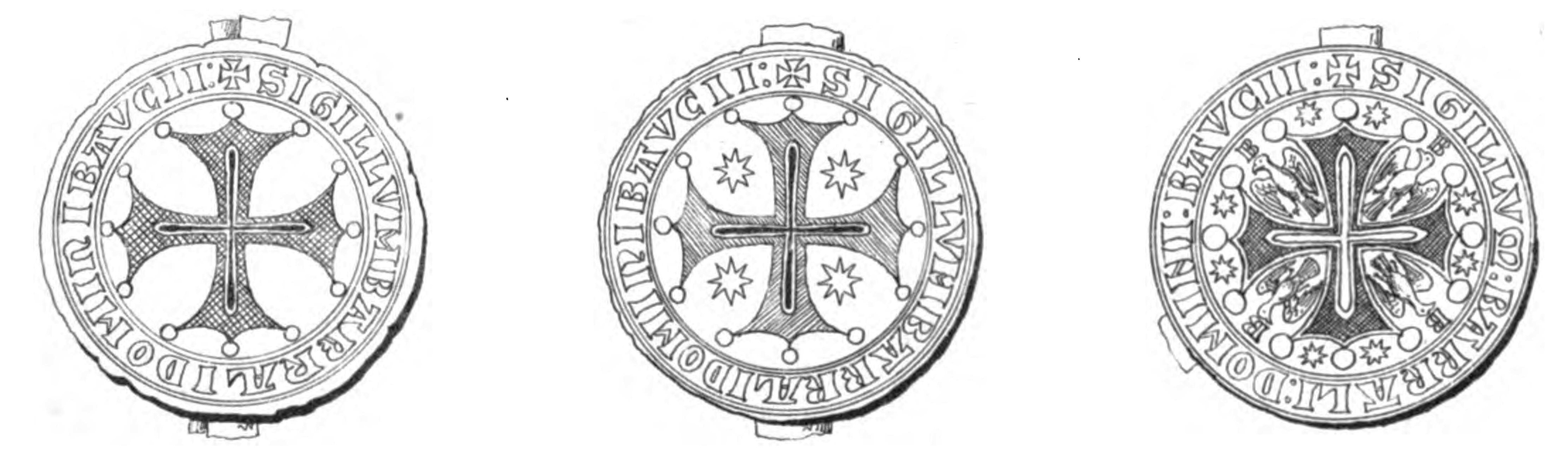 Sceau de Bertrand des Baux. XIII siecle